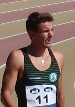 Willem Kajander 200 metrin juoksun alkueränsä jälkeen Kalevan kisoissa 2020.